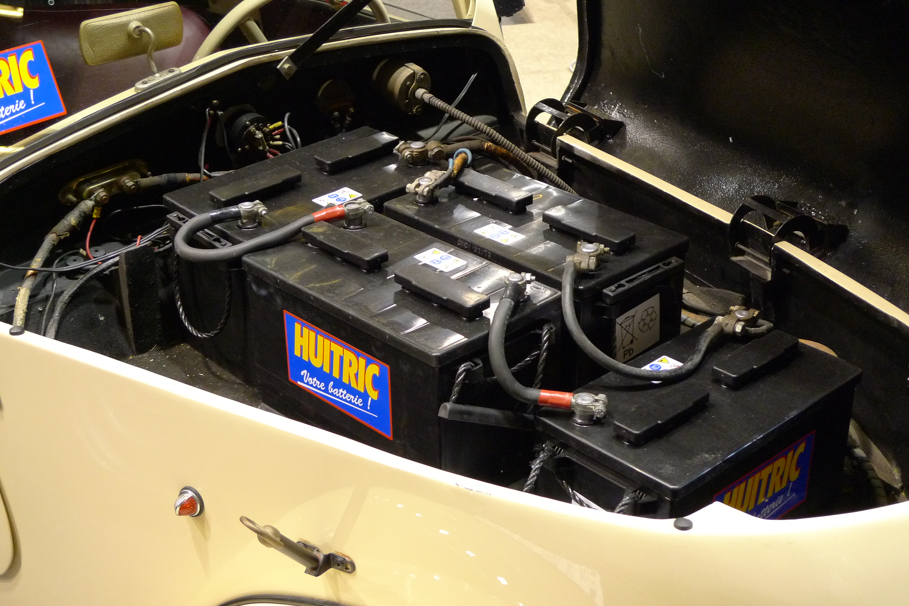 Salon Retromobile 2009 Rétromobile 2009, Paris, France.